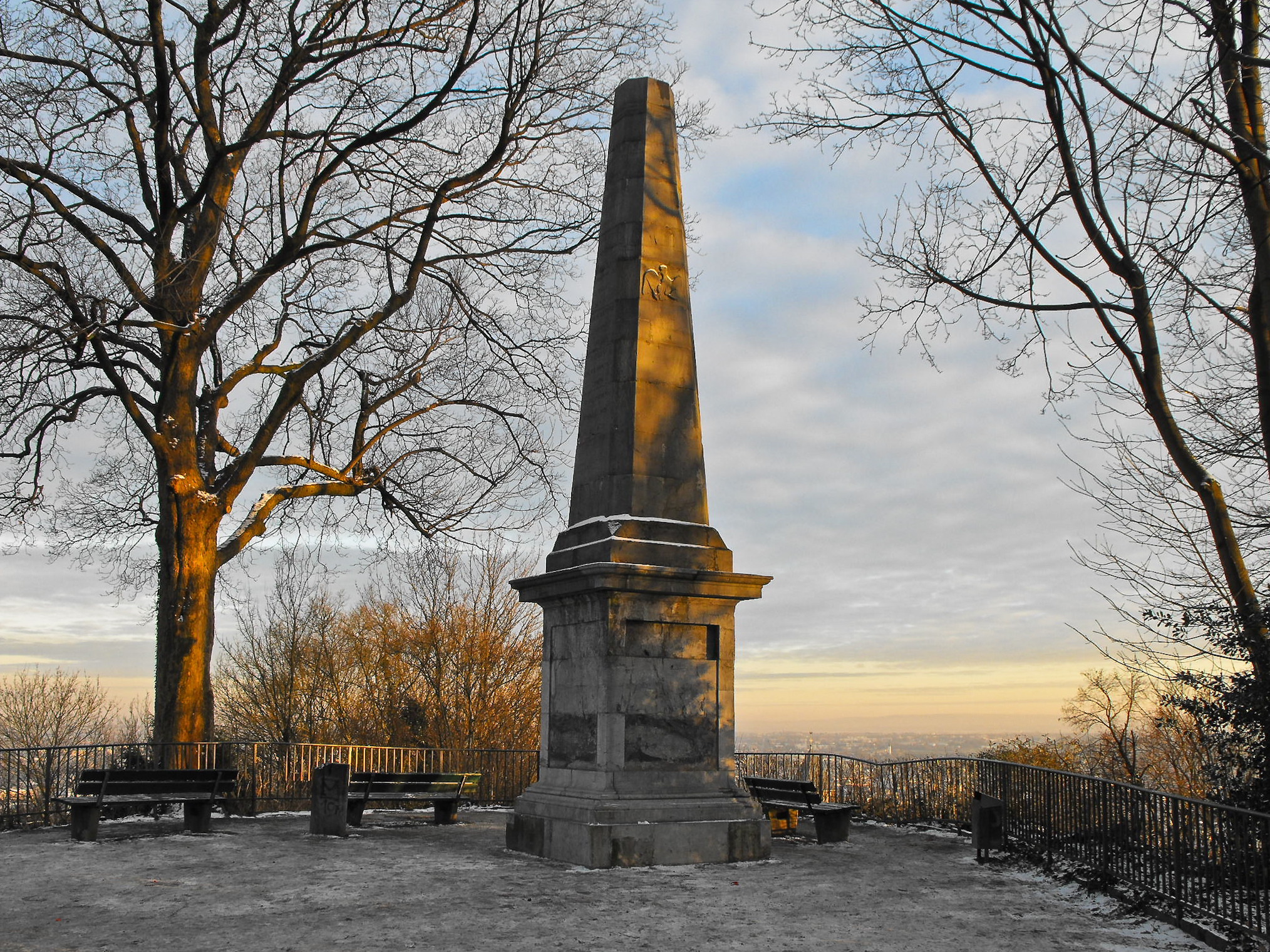 Obelisk auf dem Lousberg, 1807 errichtet zur Erinnerung an den Ausgangspunkt der Landvermessung der Rheinlande durch Tranchot & Müffling